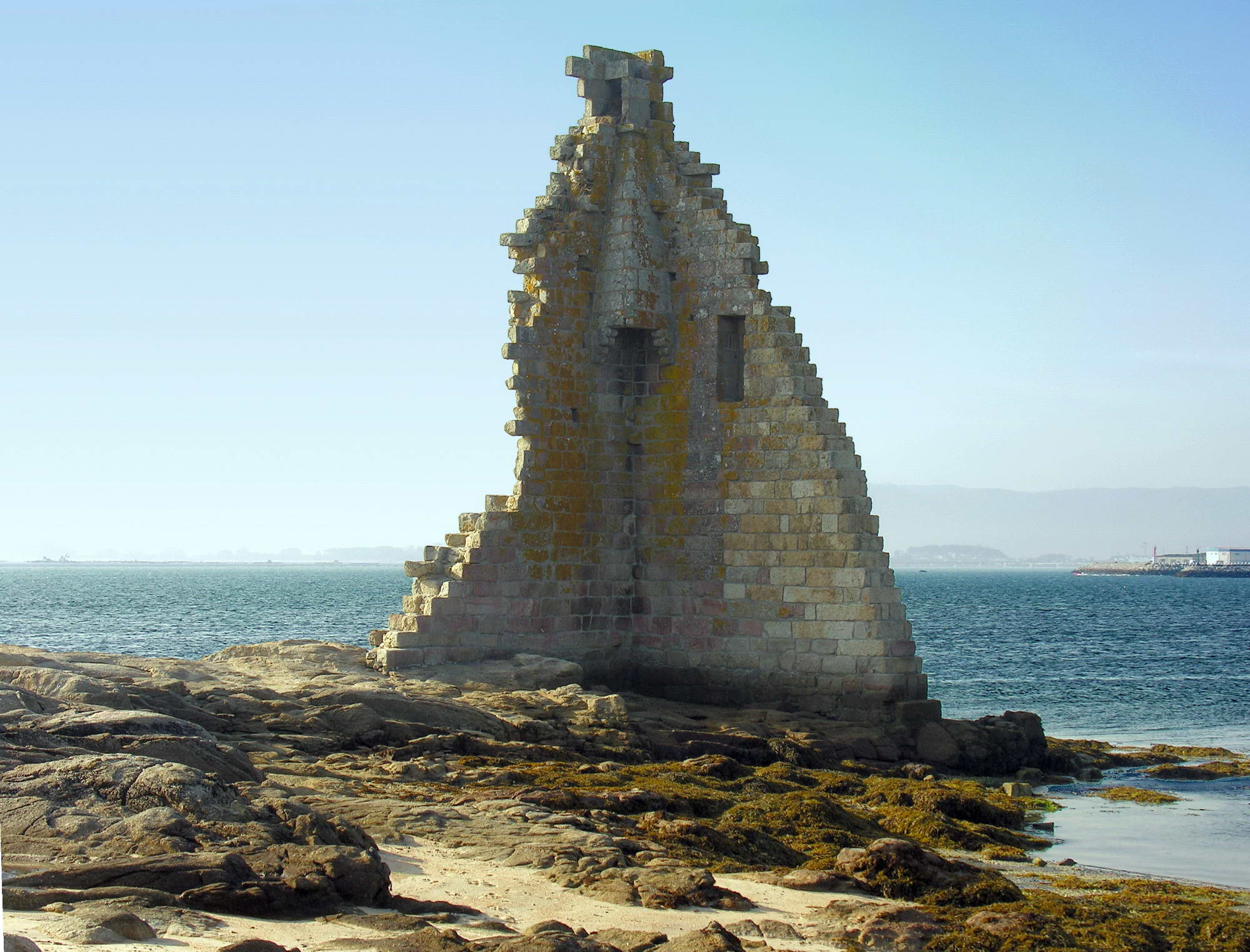 Ría de Arousa, Cambados, Galicia, España Publish by= Luis Miguel Bugallo Sánchez. Self made.